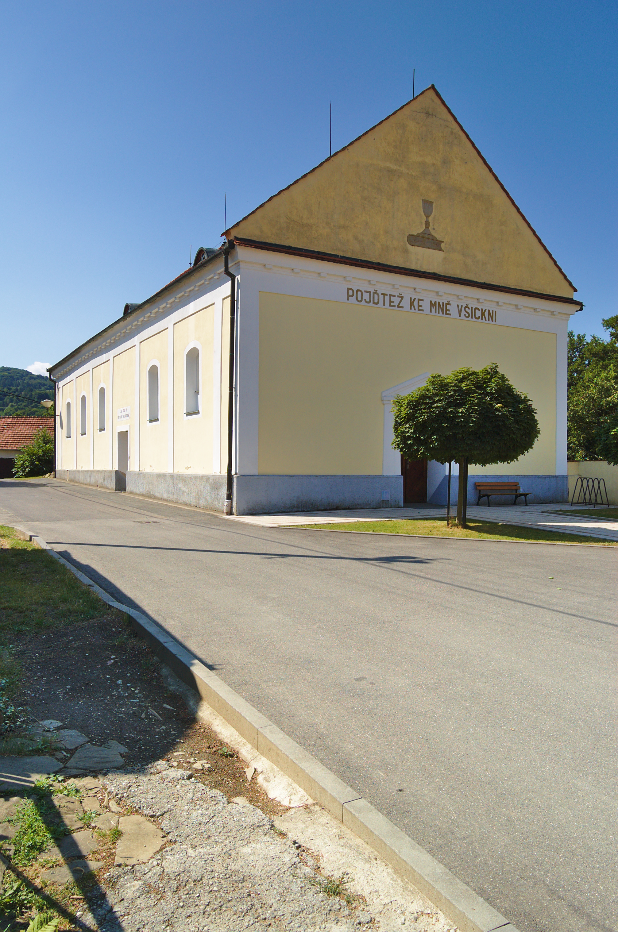 Evangelický kostel, Javorník, okres Hodonín